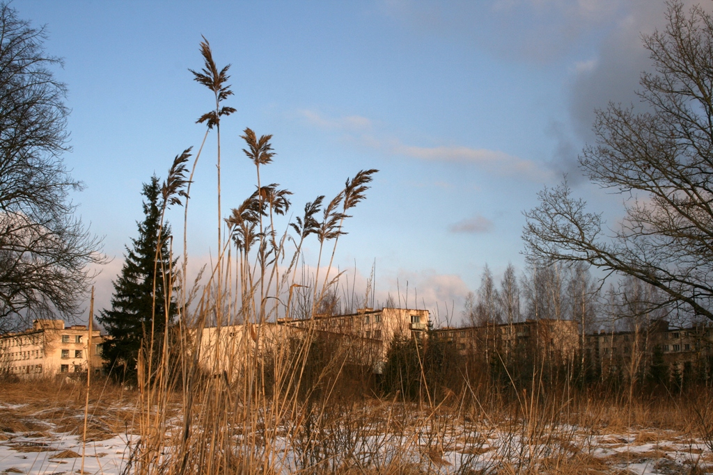 Скрунда, военныи городок